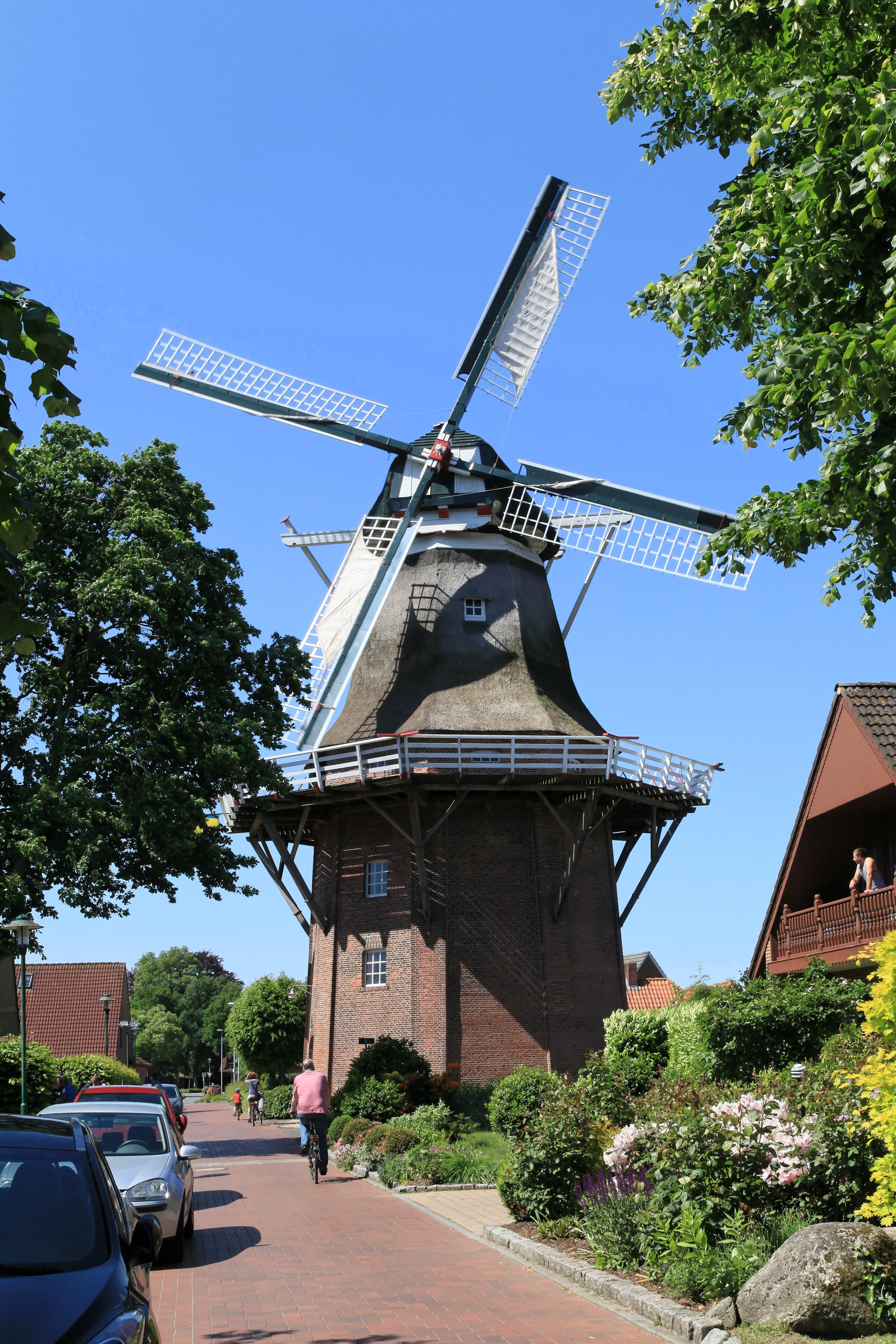 Mühle Scharrel an der Mühlenstraße in Scharrel, Saterland am Deutschen Mühlentag 2018